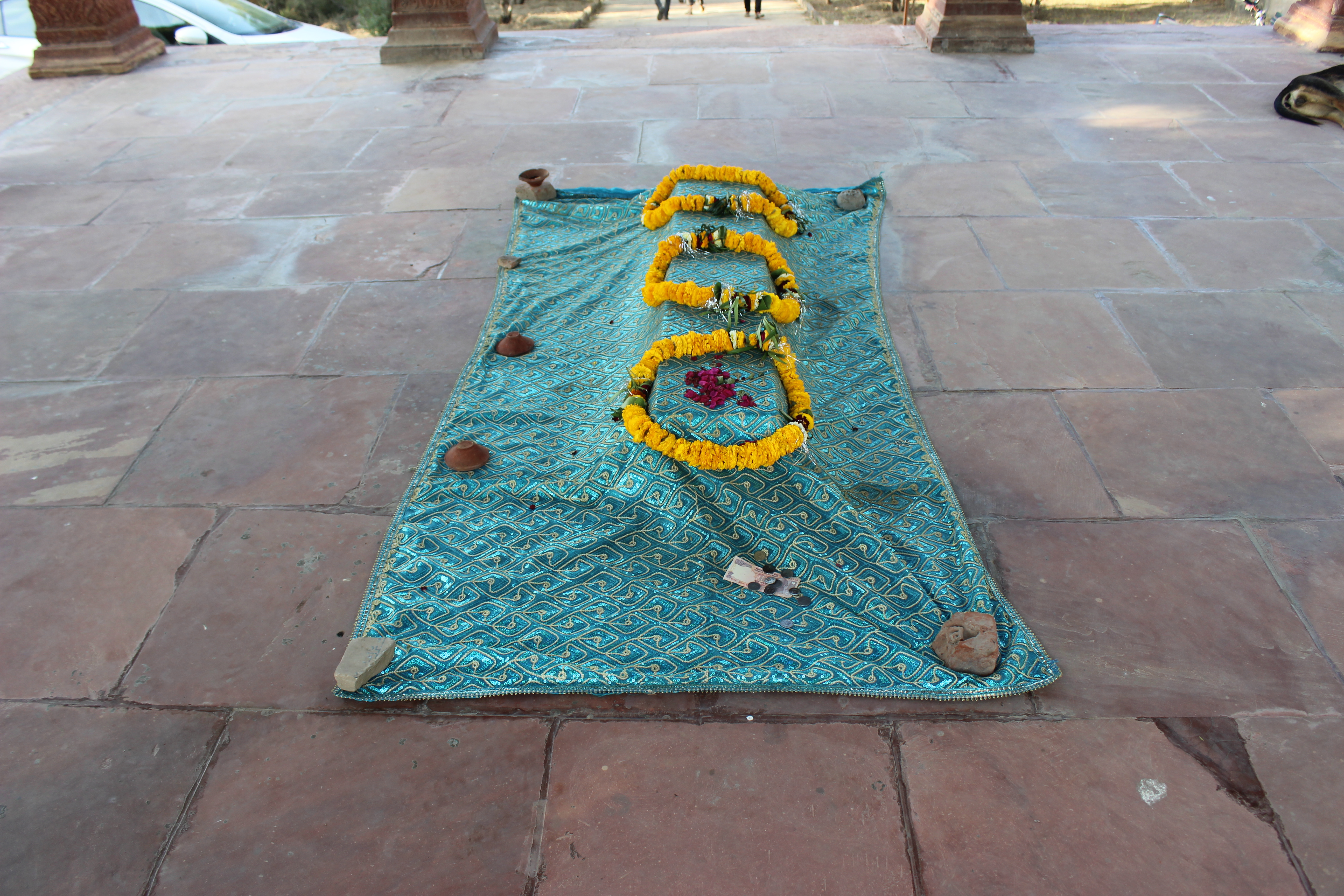 महाकवि रसखान की महाबन (जिला मथुरा) में स्थित समाधि